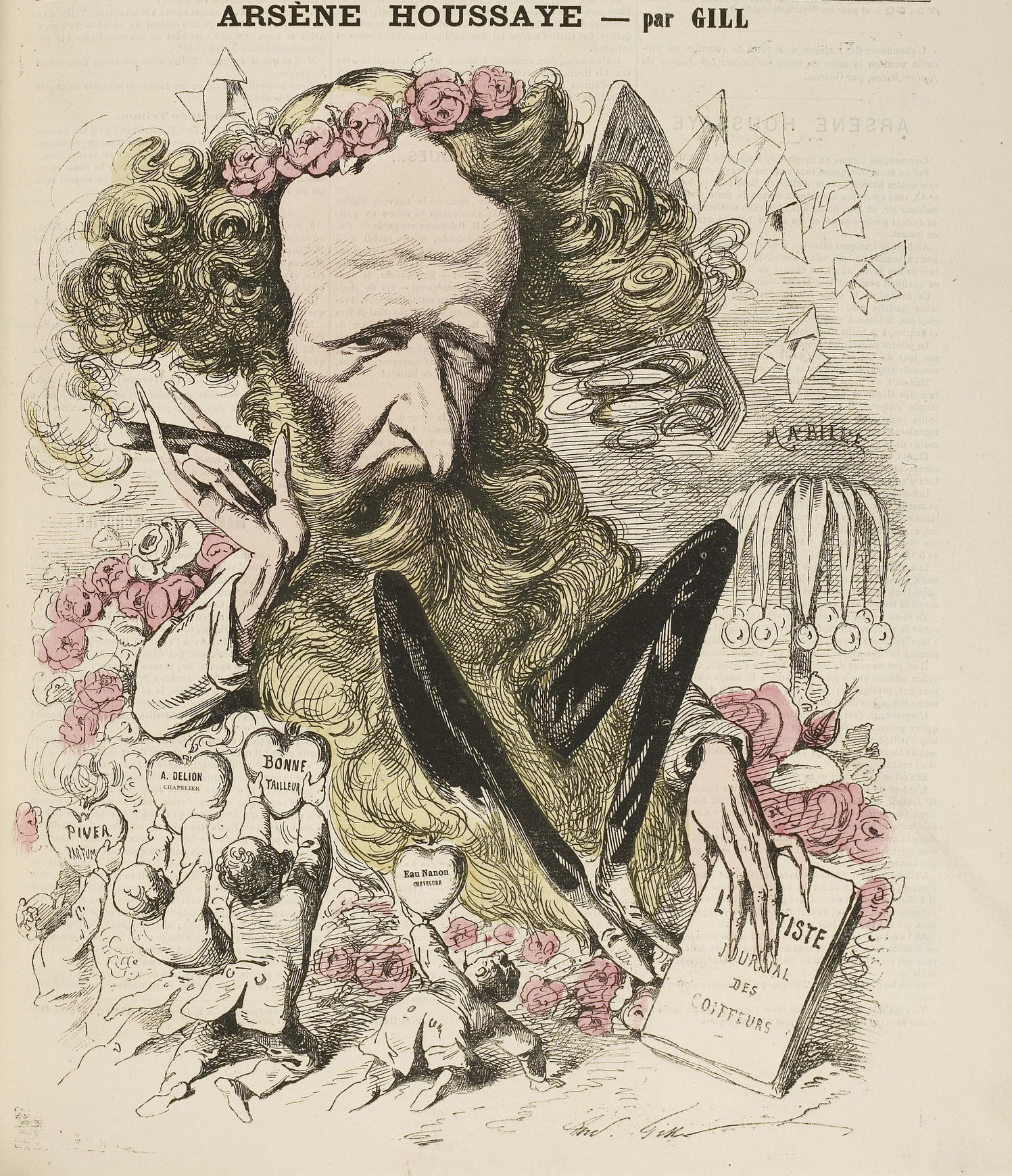 Arsène Houssaye; Caricature parue dans L'Eclipse du 28 juin 1868.